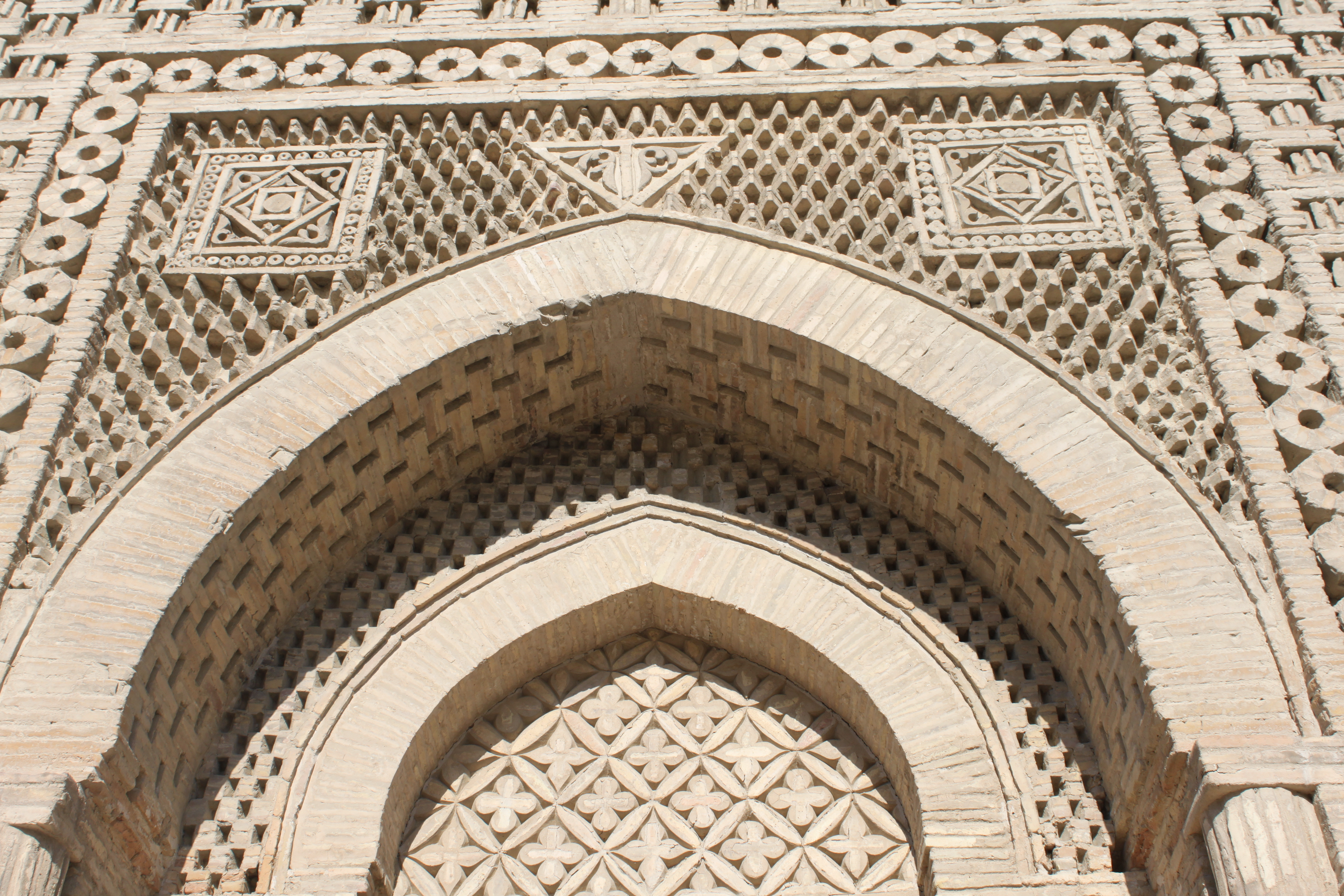 Detail extérieur du mausolée samanide à Boukhara